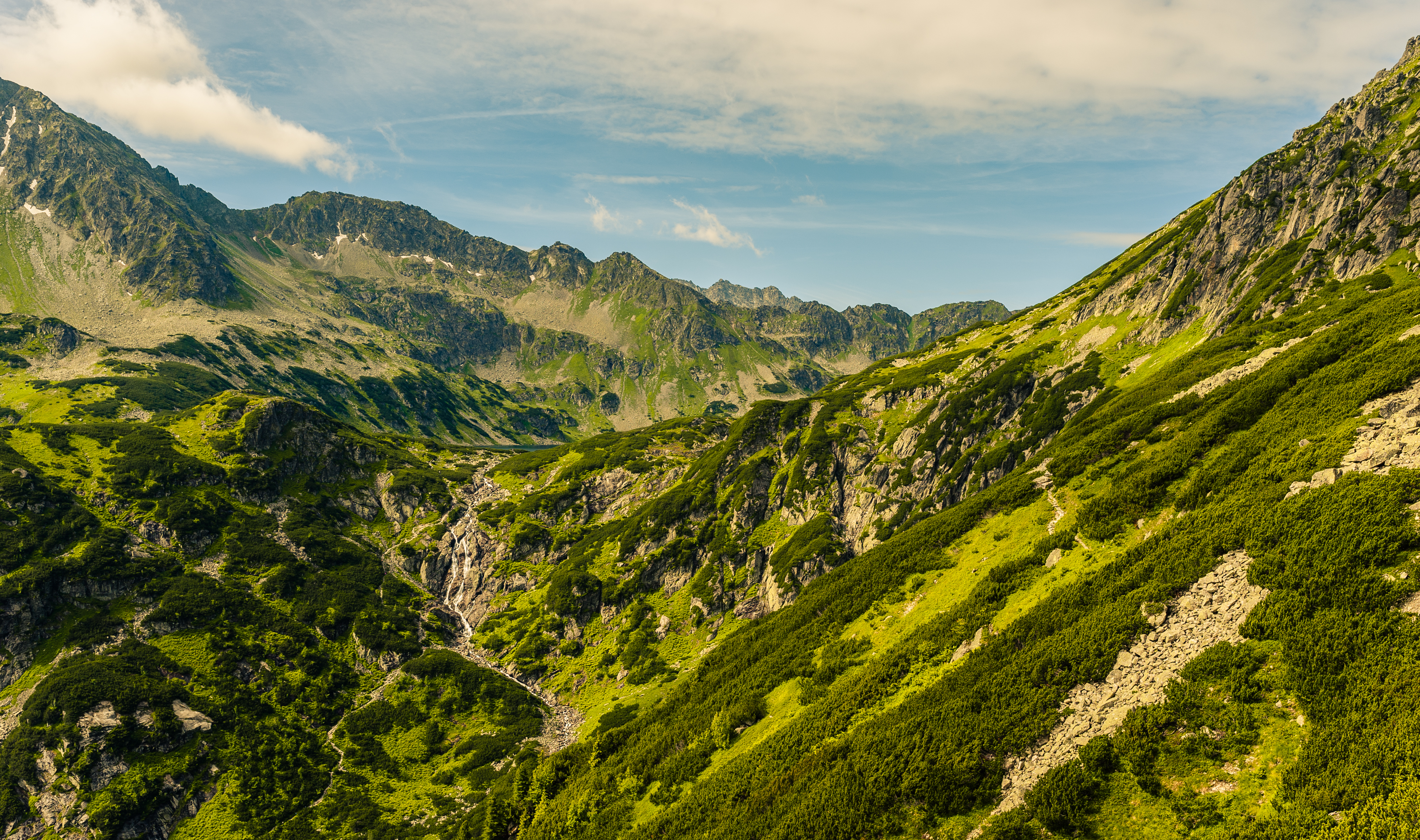 Park narodowy: Tatrzański Park Narodowy This is a photography of protected area with CRFOP ID PL.ZIPOP.1393.PN.14